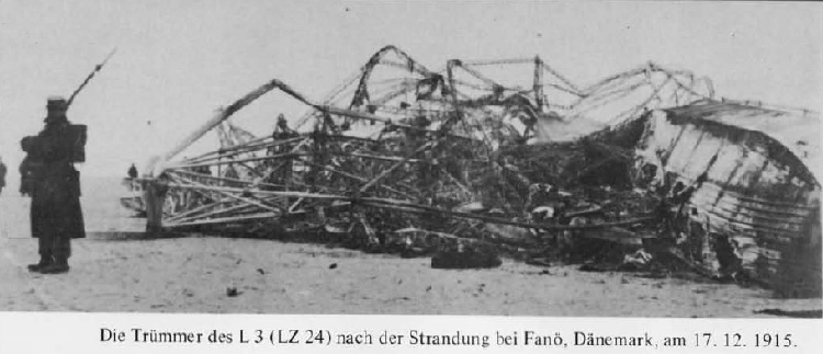 Die Trümmer des L3 (LZ 24) nach der Strandung bei Fanö, Dänemark, am 27.12.1915